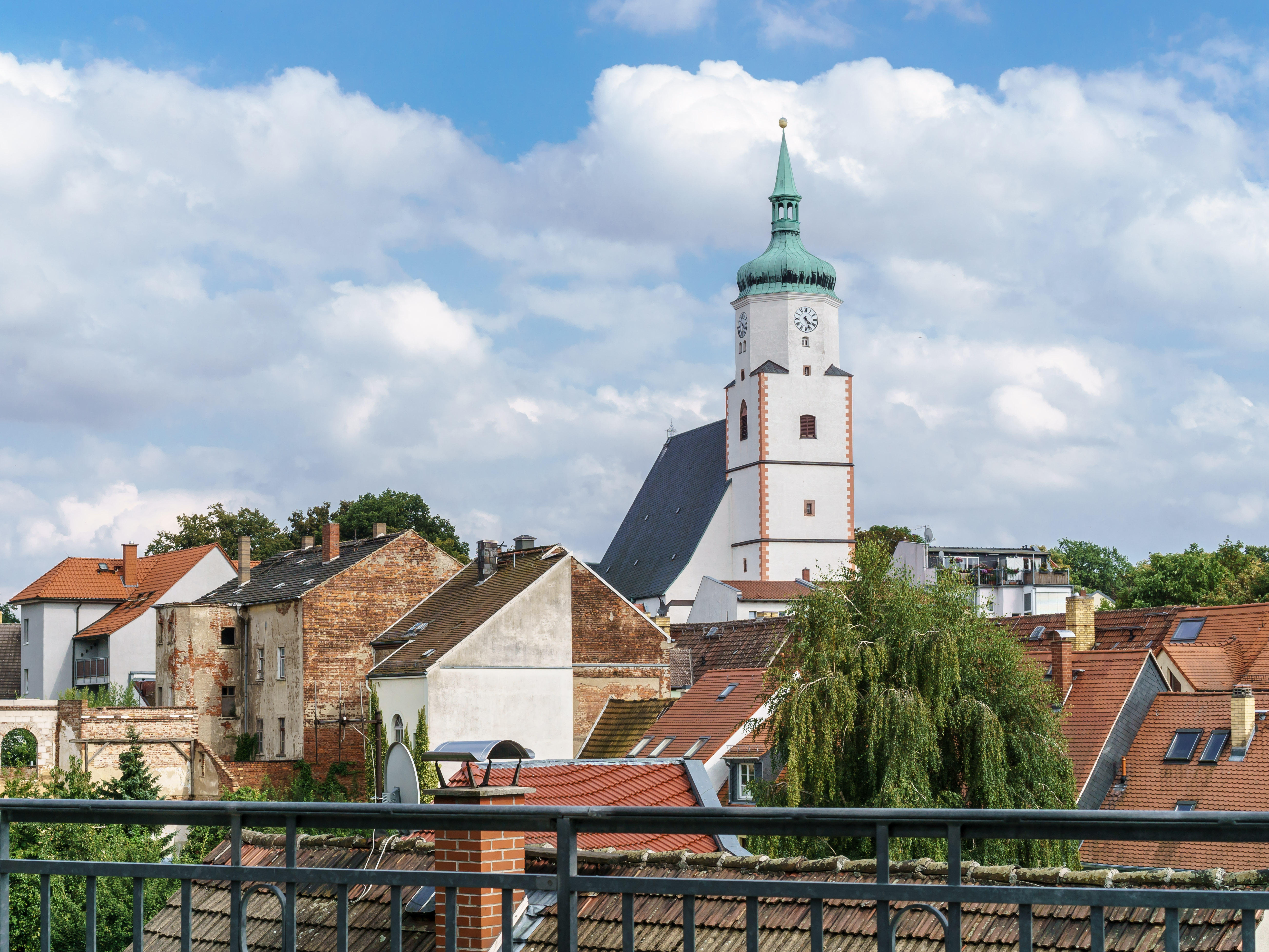 Blick von den Schultreppen auf die St. Wenceslaikirche in Wurzen